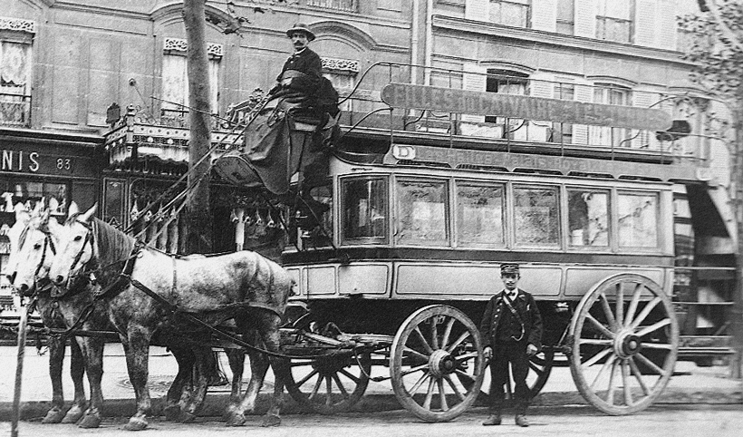 Omnibus à impériale à trois chevaux de La Compagnie Générale d'Ominibus (CGO) vers 1890, ligne D, Filles-du-Calvaire/Les Ternes. Photographe anaonyme.